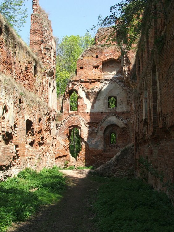 Бальга.Руины " служебного здания" форбурга. Май 2006.